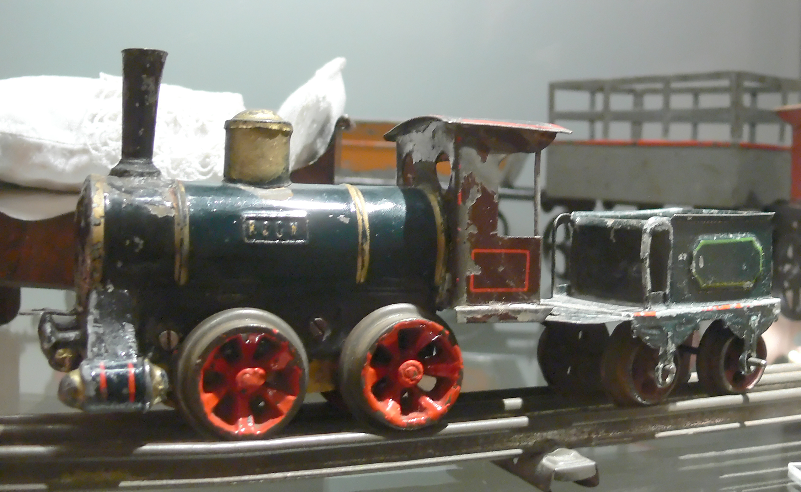 Biberach an der Riß, Braith-Mali-Museum Spielzeuglokomotive mit Tender, Rock & Graner's Nachfolger, Biberach um 1900